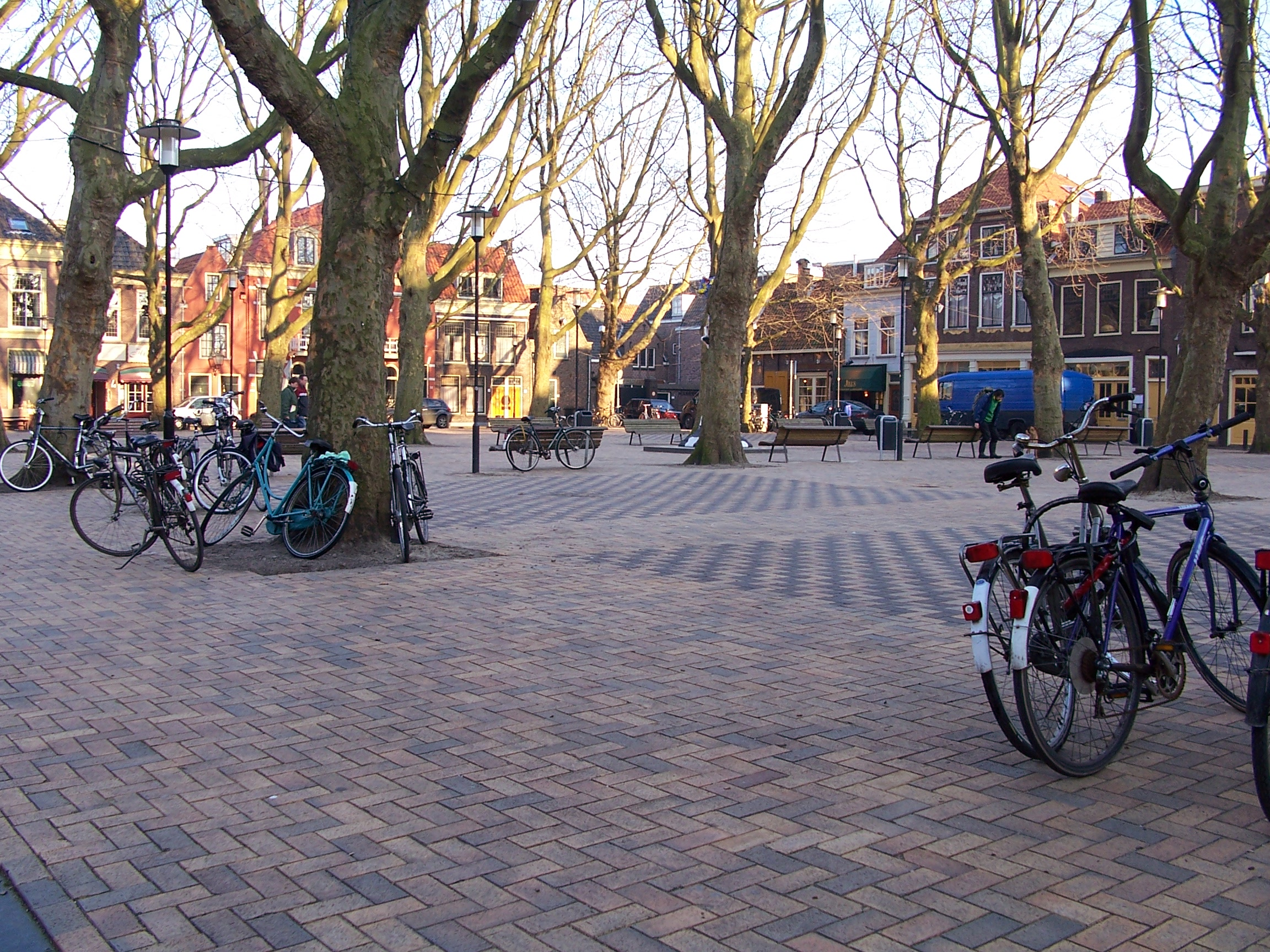 Beestenmarkt Delft (Netherlands)